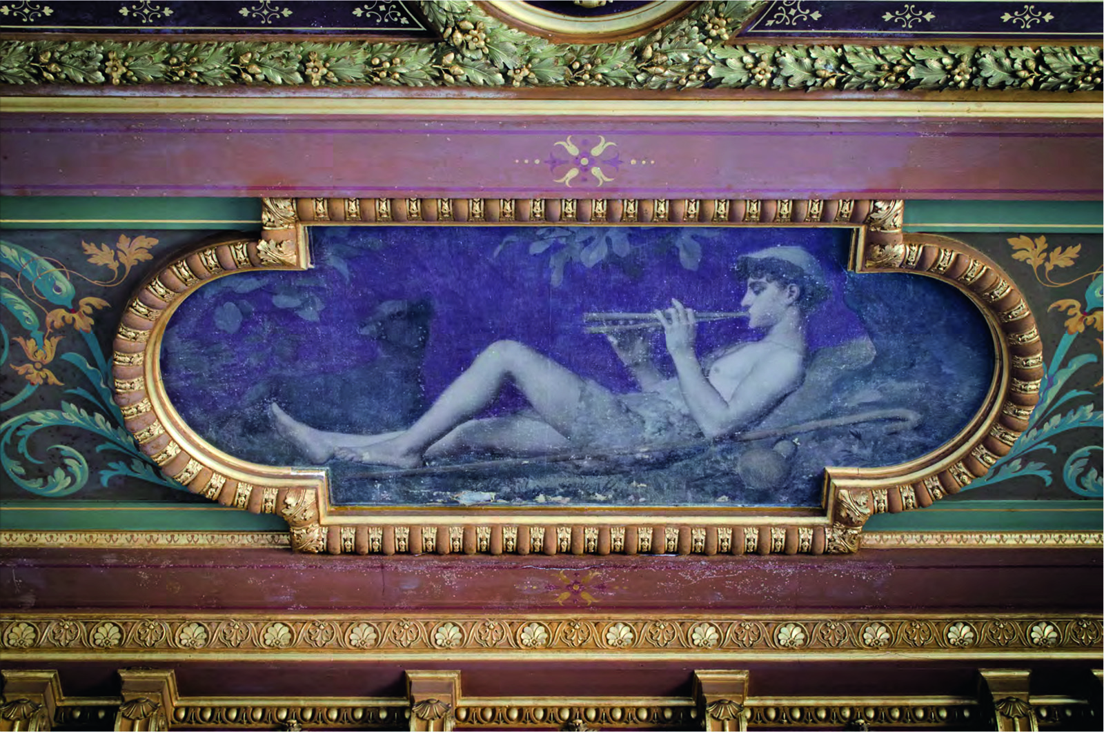 Peinture des plafonds du Château Boulart illustrant pâtre jouant de la flûte